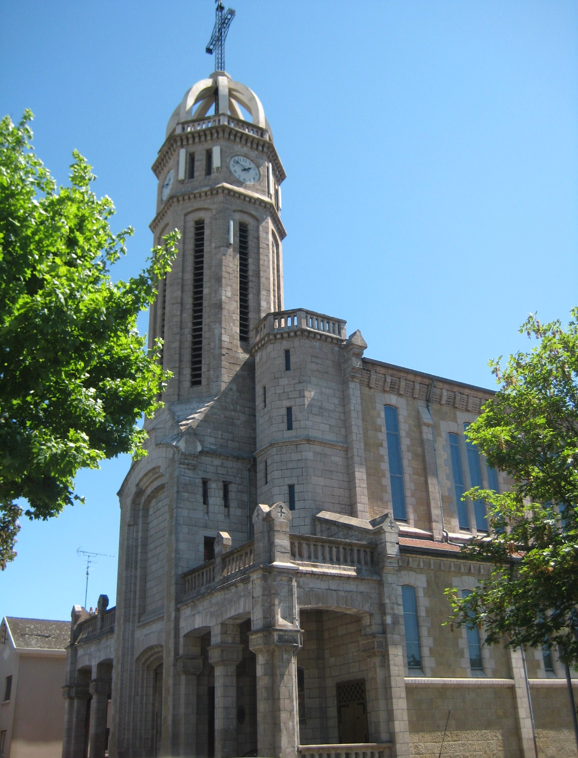 Description Église Saint Sébastien de Terville Date22 May 2009Sourcemon appareil photoAuthorAimelaime Église Saint Sébastien de Terville